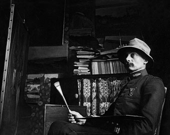 Portrait